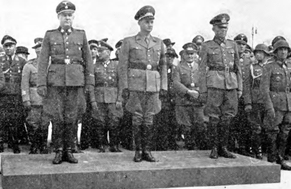 Nacistični funkcionarji v operacijski coni Jadransko primorje v Trstu: Odilo Globočnik, Friedrich Rainer in Ludwig Kübler